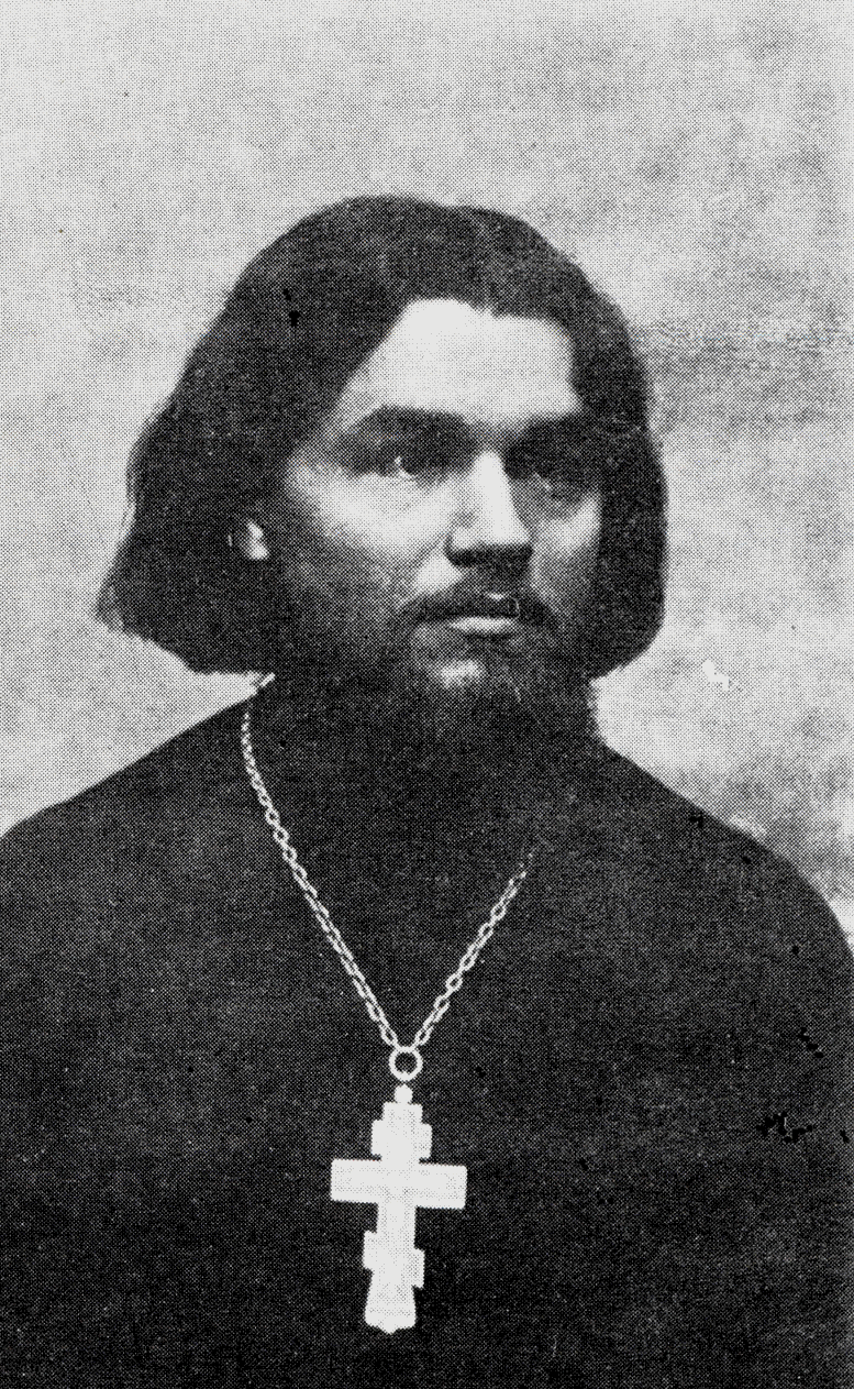 Maksym Sandowycz